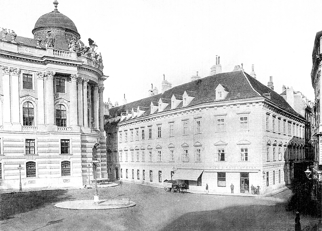 Das alte Wiener Café Griensteidl am Michaelerplatz vor 1897